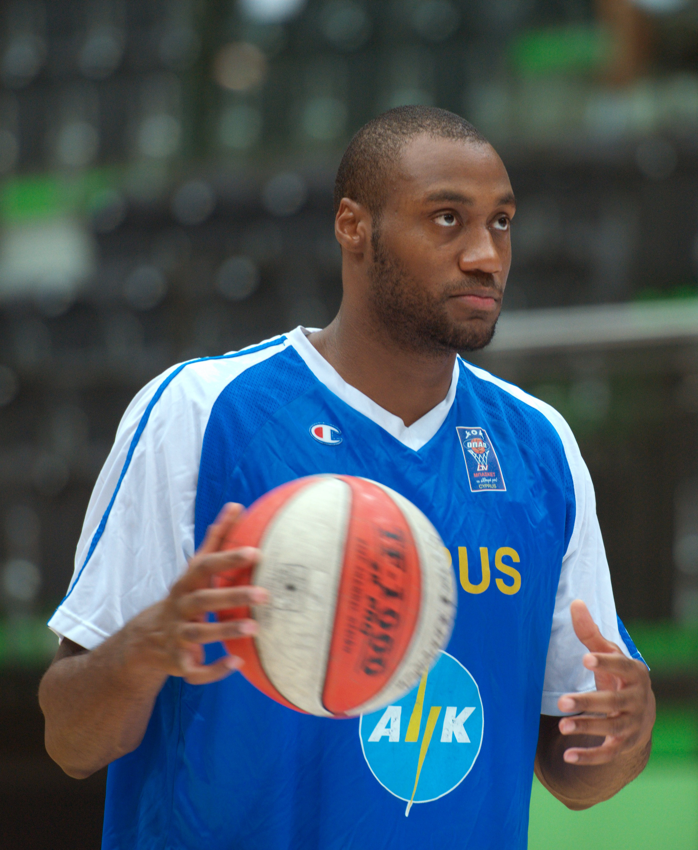 Anthony King beim Aufwärmen zum Eurobasket-Qualispiel in Österreich, 2012